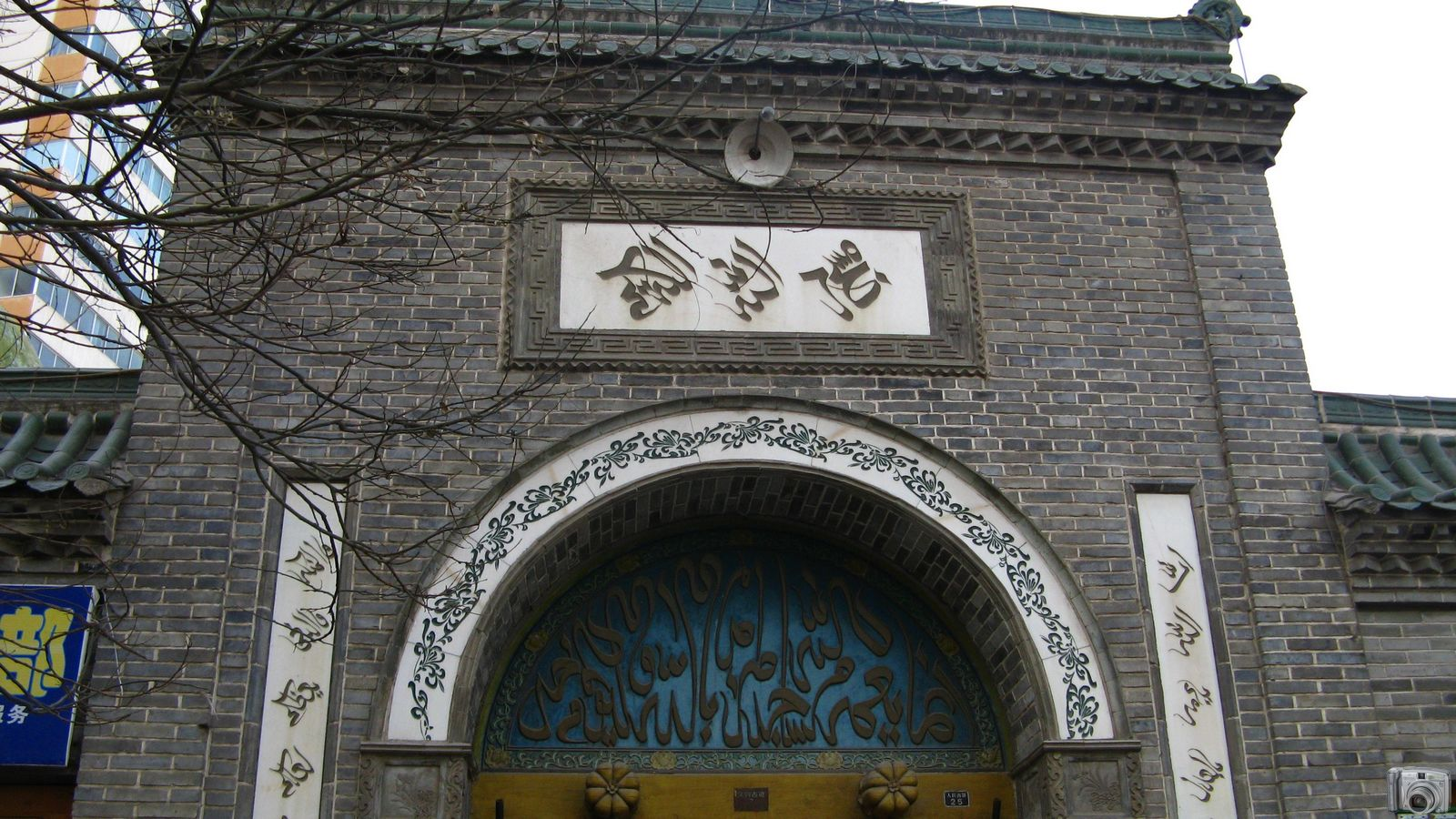 后街清真寺